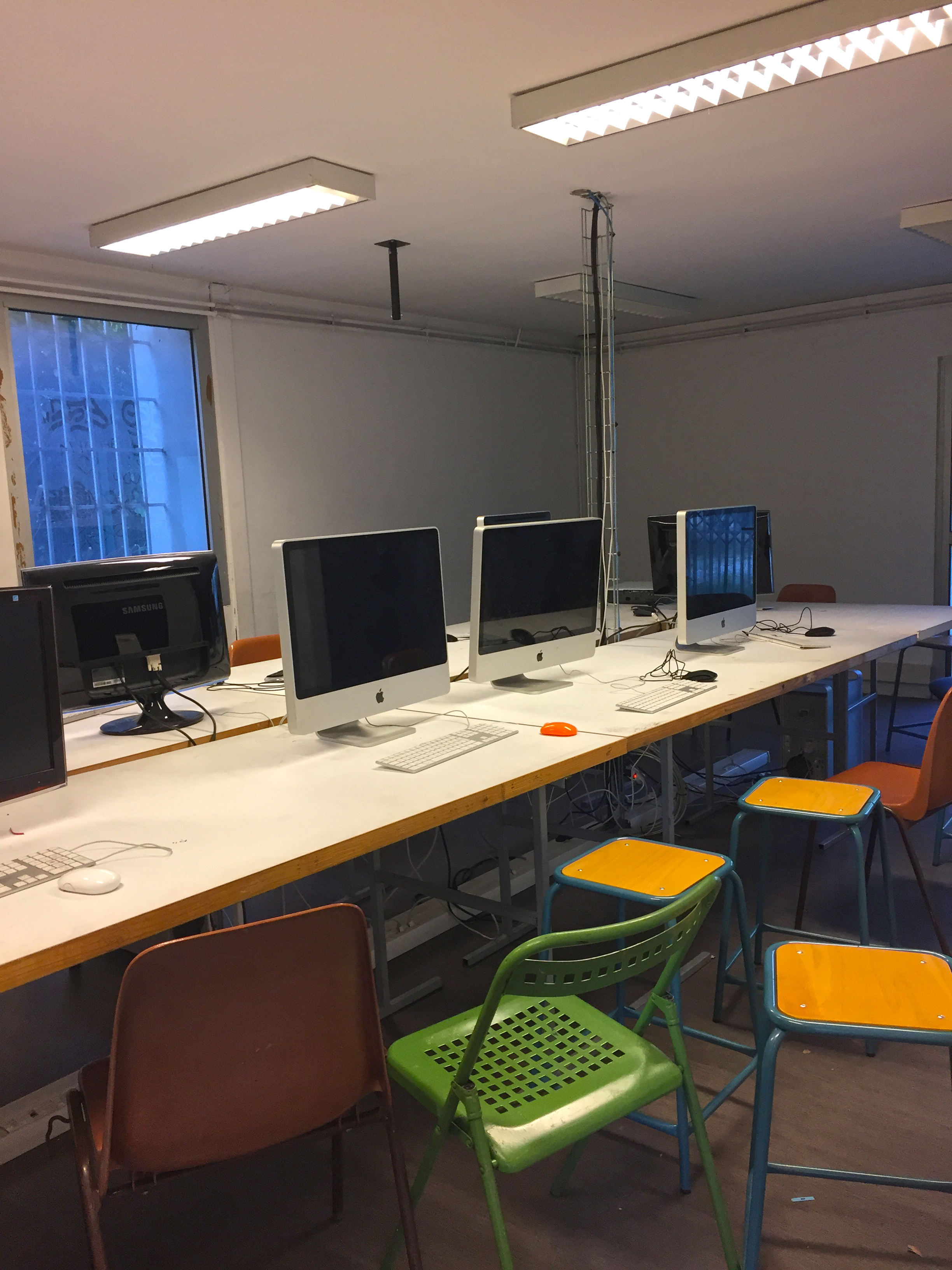 Vue générale de salle d'informatique de l'École supérieure des beaux-arts de Montpellier Méditerranée Métropole (ESBAMA) à Montpellier (Hérault).